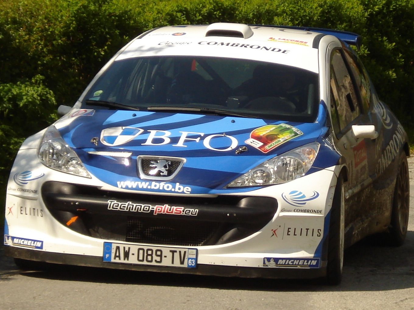 Freddy Loix